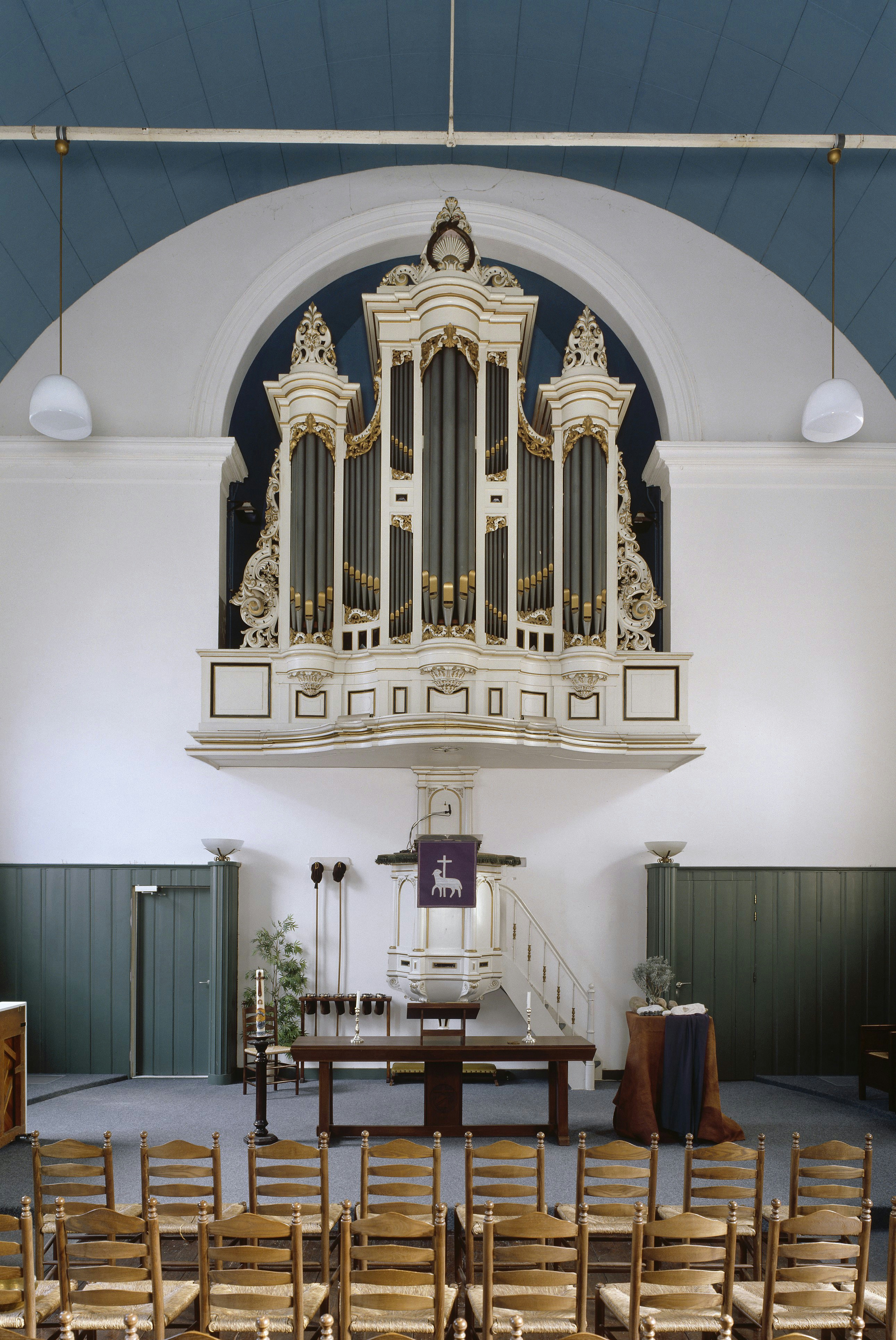 Nederlands Hervormde Kerk: Intenieur, aanzich goed, orgelnummer 287 (opmerking: Gefotografeerd voor Het Historische Orgel in Nederland 1872-1878, bladzijde 56)